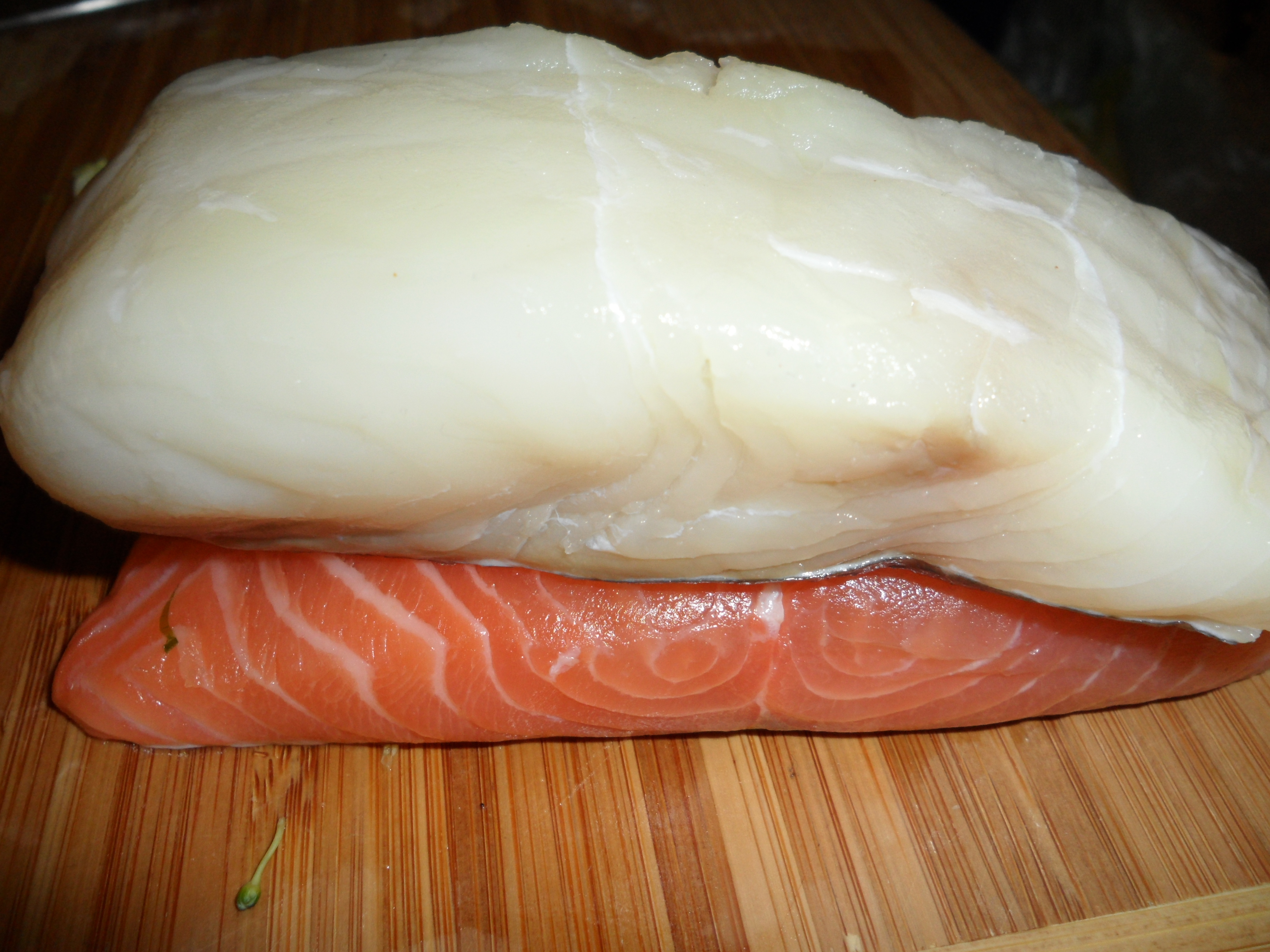 פילה של הליבוט וסלמון